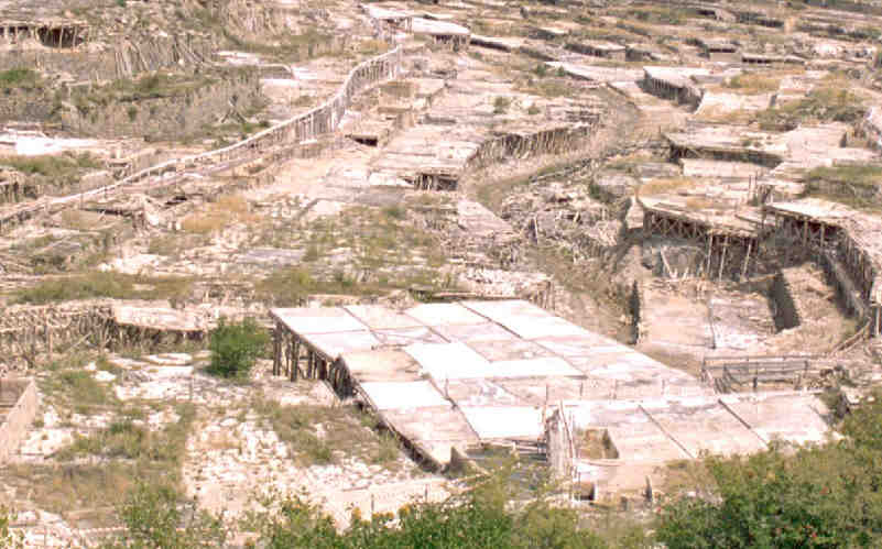 Salinas de Añana en la provincia de Álava (España). Tomada por --JMSE el 4 de julio de 2003 y cedida a Wikipedia.